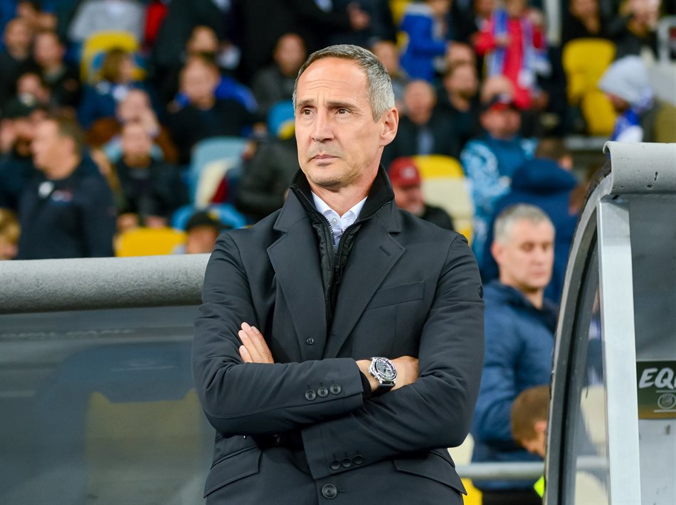 Adi Hütter beim Europa-League-Spiel Dynamo Kiew gegen BSC Young Boys